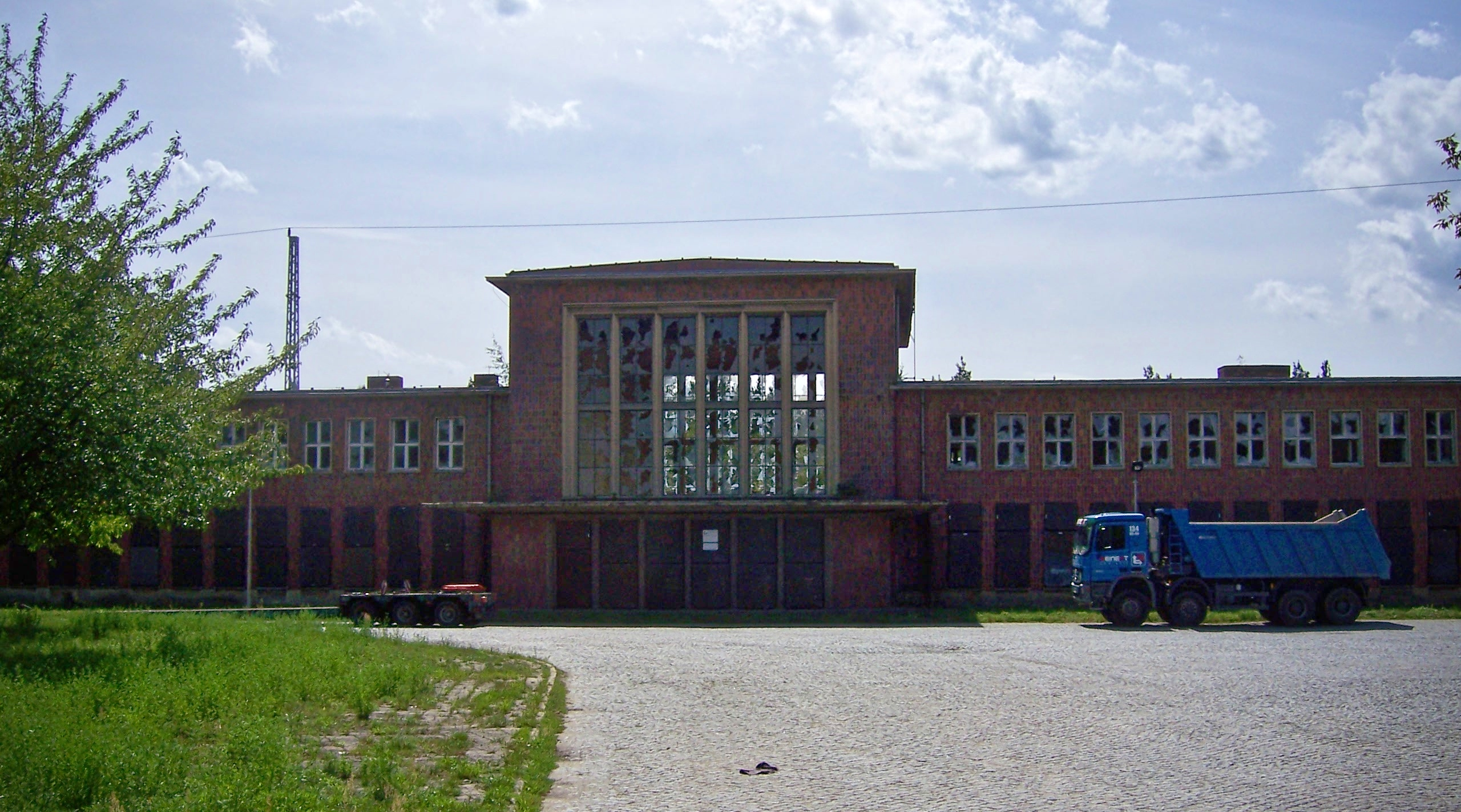 Stillgelegter Bahnhof des Kraftwerkes Schwarze Pumpe